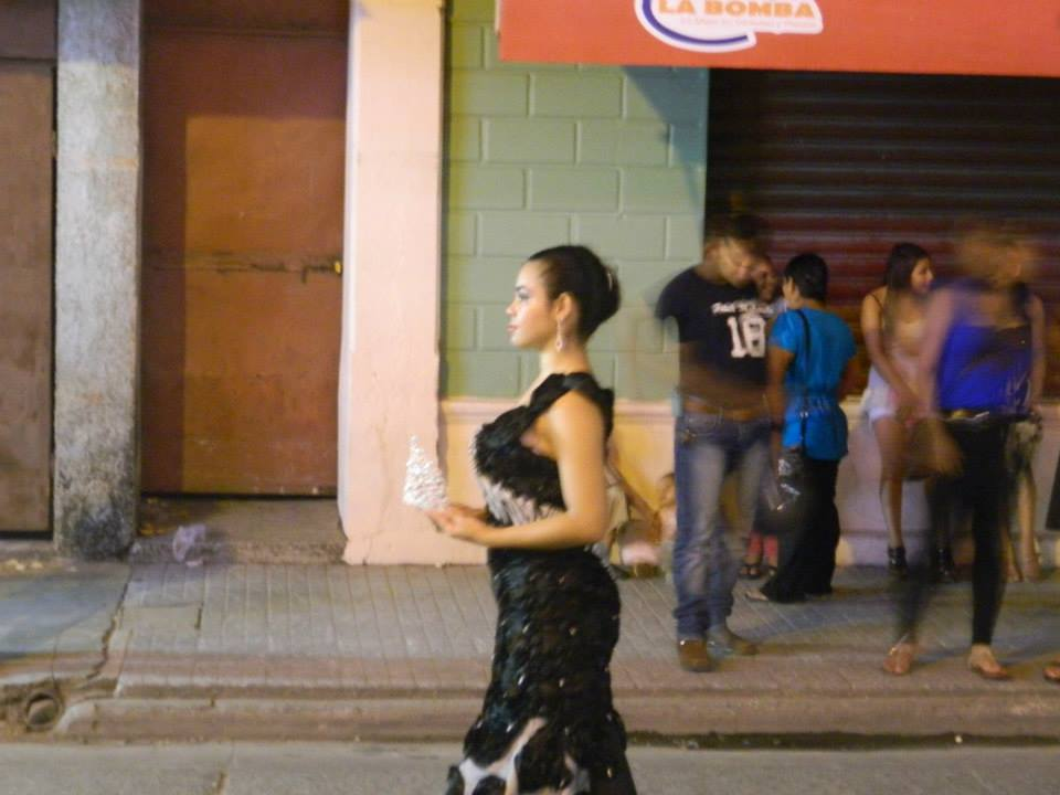 Reina de Belleza, Feria Patronal